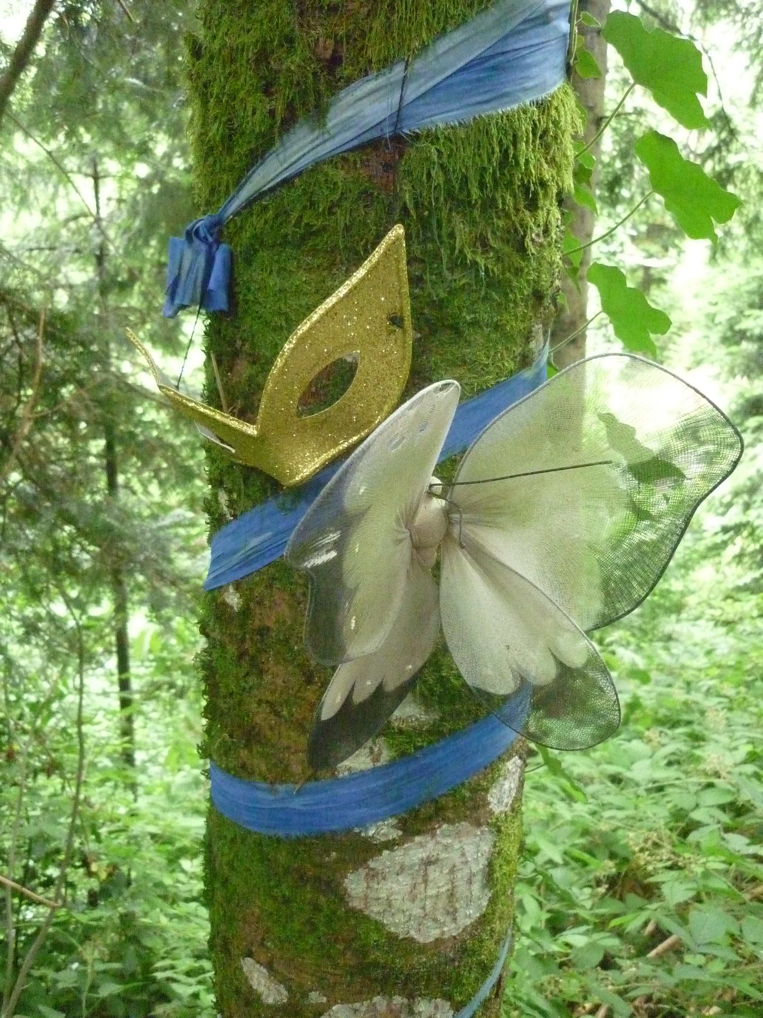 Detail eines geschmückten Baums im Faerie Sanctuary Folleterre